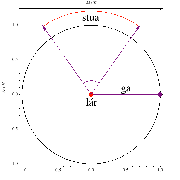 Stua an Chiorcail